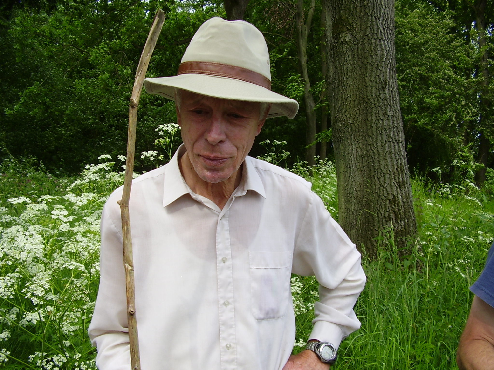 Ger Londo gefotografeerd tijdens een excursie in de Ger Londo tuin in Leersum